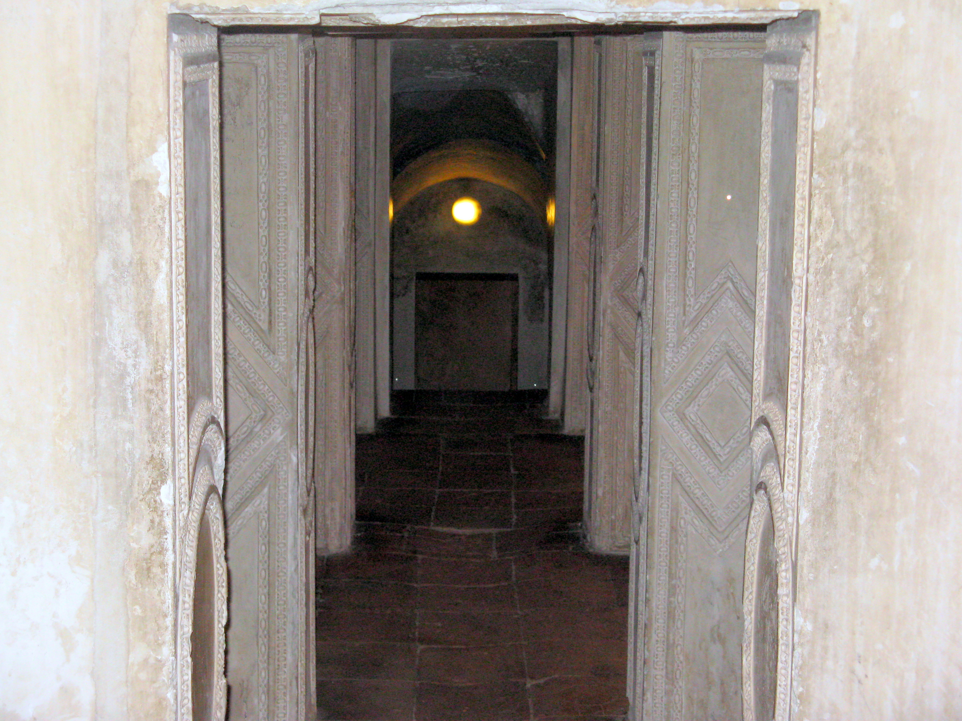 Scala Santa in Palazzo Ducale